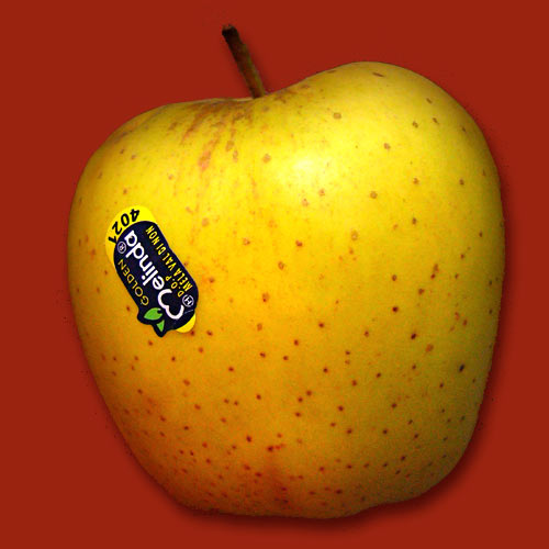 Una "Melinda"